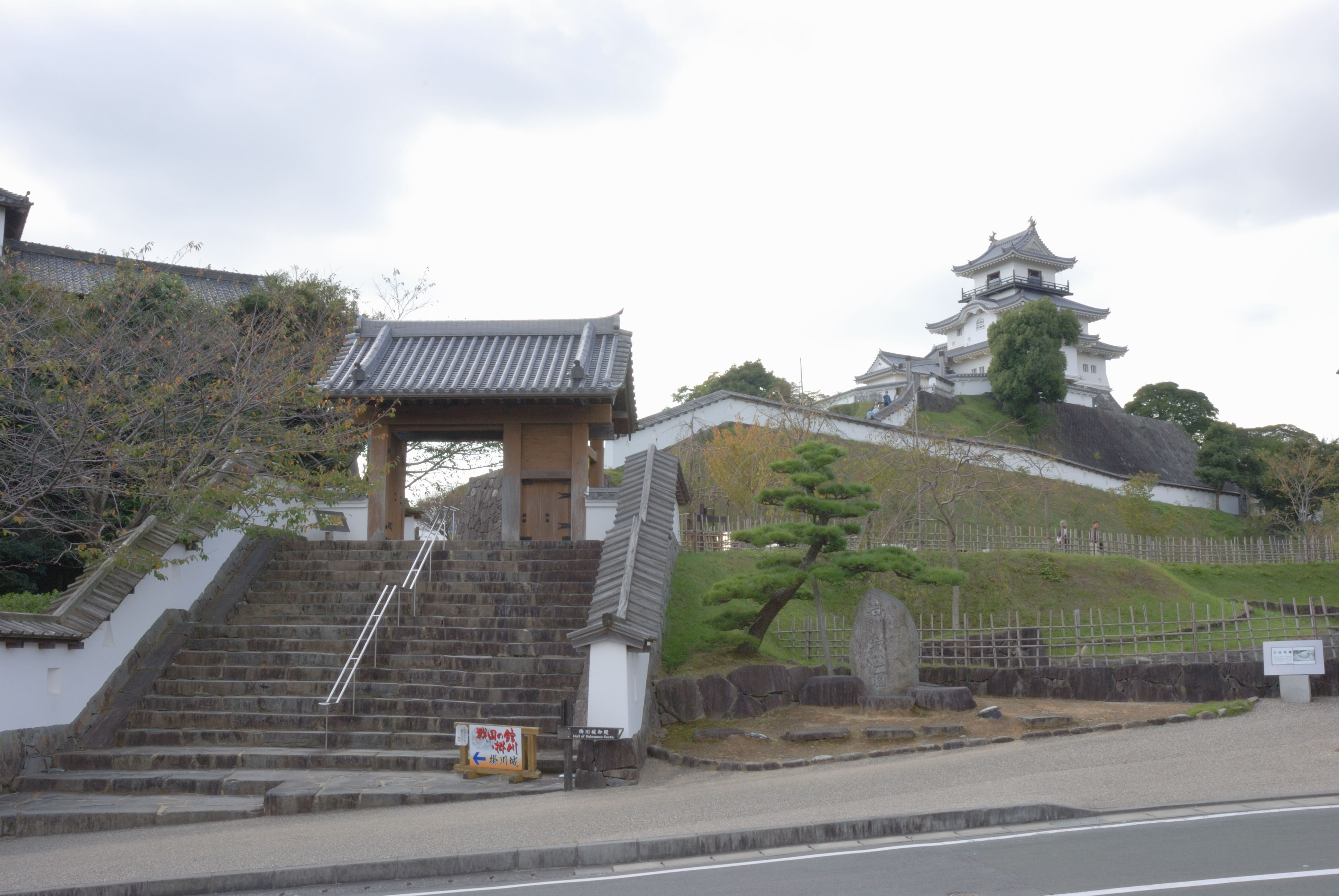 Kakegawa castle